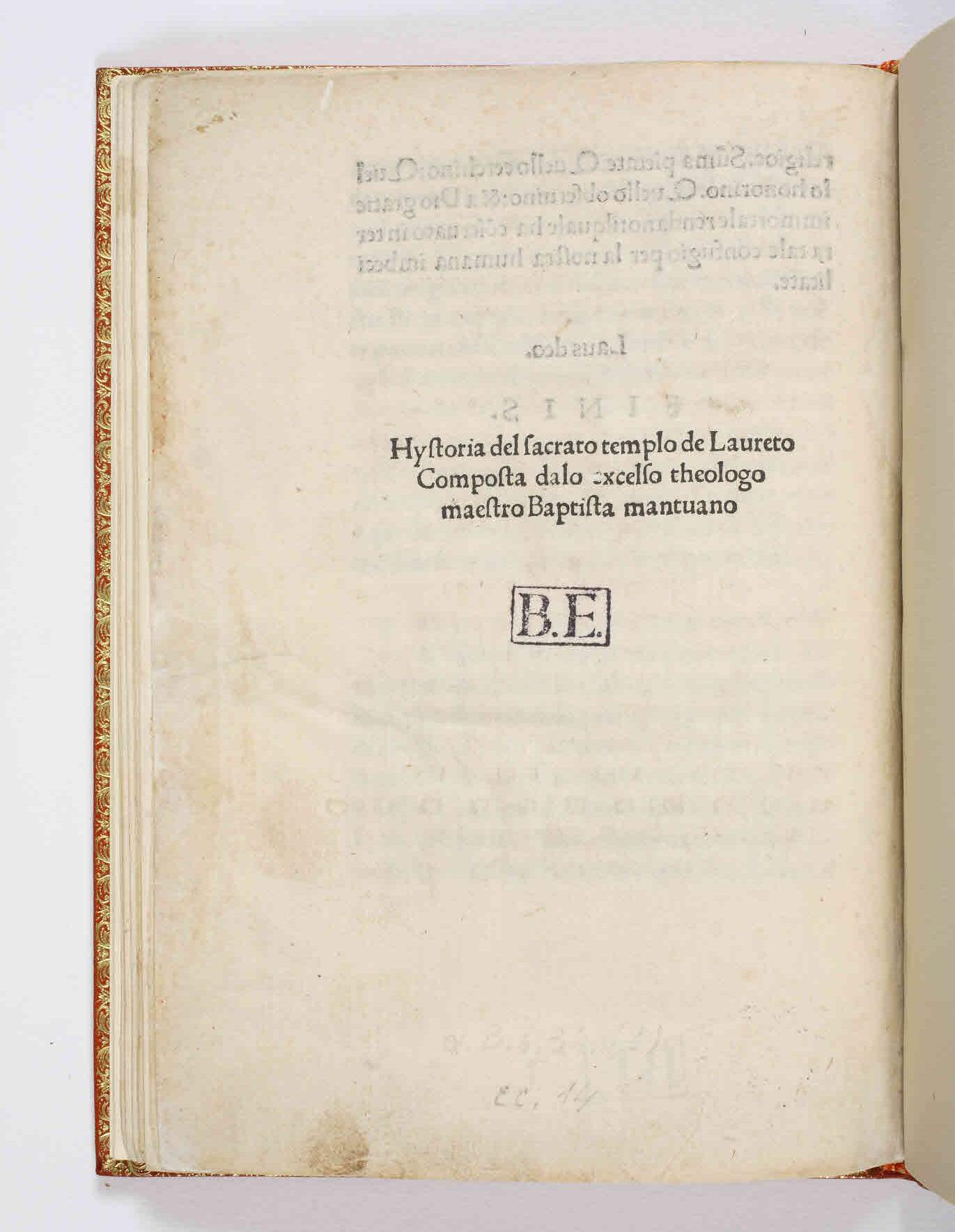 Redemptoris mundi matris ecclesiae Lauretanae historia (italiano). - [Bologna] : [Platone Benedetti], [circa 1489]. - 14 c. ; A⁸, B⁶ ; 4° .